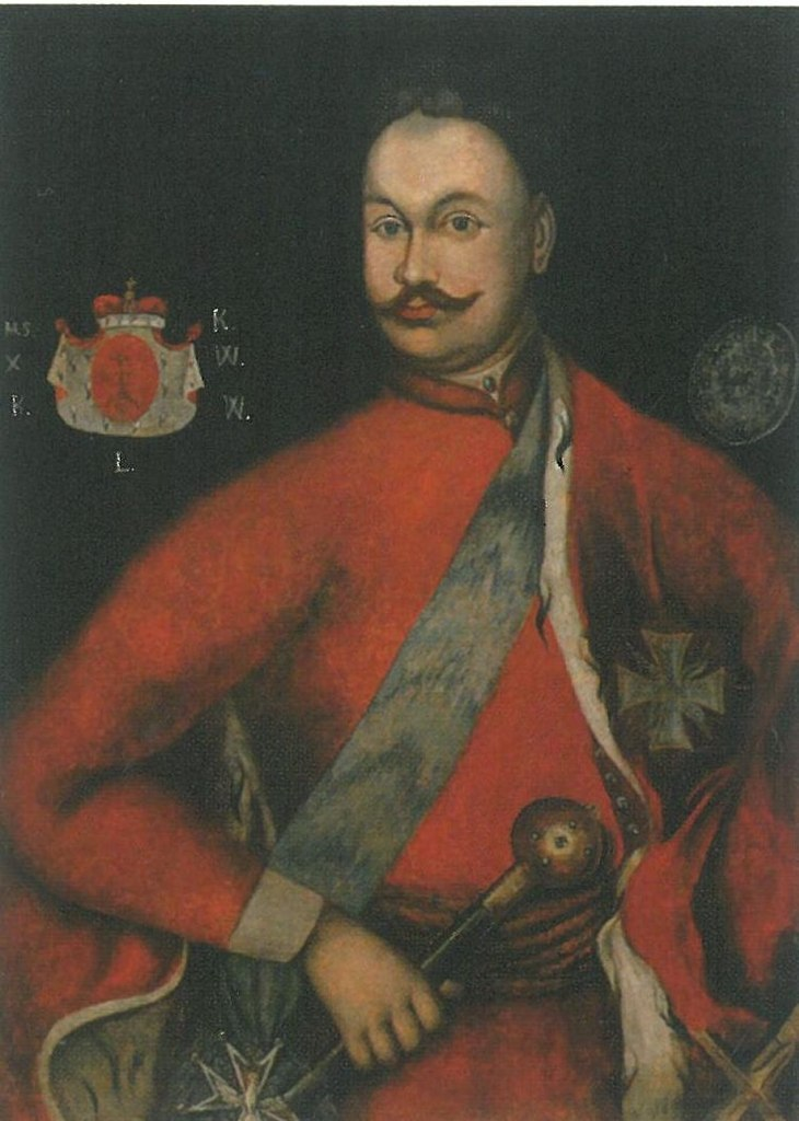 Беларуская (тарашкевіца): Партрэт Міхала Сэрвацыя Вішнявецкага (Michał Servacy Višniaviecki)